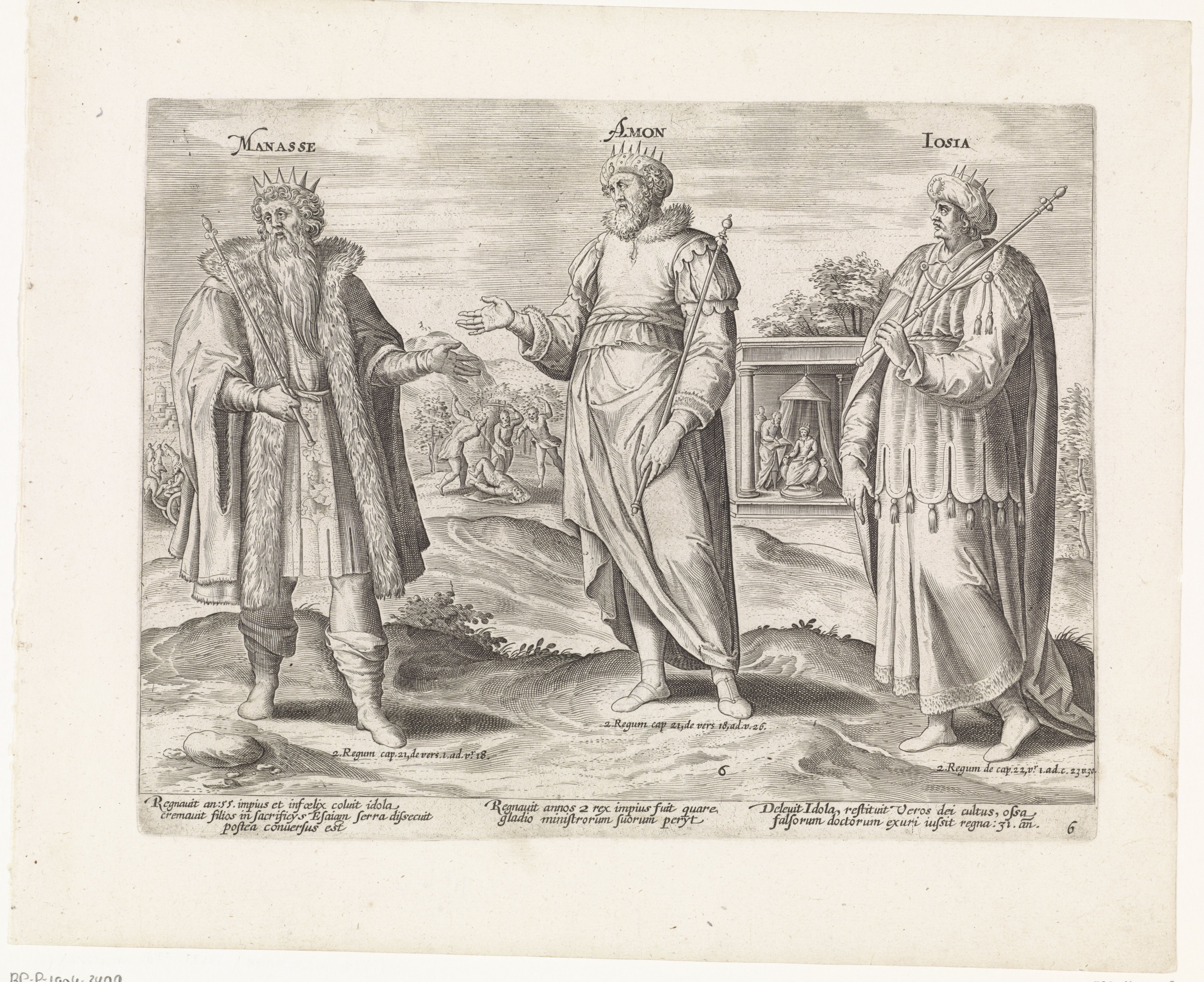 IdentificatieTitel(s): Manasse, Amon en JosiaKoningen van Juda (serietitel)Theatrum biblicum (...) (serietitel)Objecttype: prent Serienummer: 6/8Objectnummer: RP-P-1904-3499Catalogusreferentie: Mielke 39-2(2)Opschriften / Merken: verzamelaarsmerk, verso, gestempeld: Lugt 2228Omschrijving: De koningen Manasse, Amon en Josia. Op de achtergrond enkele belangrijke gebeurtenissen uit hun leven. Links op de achtergrond zit koning Manasse in zijn strijdwagen. Midden op de achtergrond de moord op Amon door zijn eigen dienaren. Rechts op de achtergrond laat koning Josia zich voorlezen uit een boekrol die in de tempel werd gevonden. Onder de voorstelling verwijzingen naar de Bijbelteksten in het Latijn.VervaardigingVervaardiger: naar ontwerp van: Jan Snellinck (I) (toegeschreven aan)prentmaker: anoniemuitgever: Claes Jansz. Visscher (II)Plaats vervaardiging: AmsterdamDatering: 1585 en/of 1643Fysieke kenmerken: gravureMateriaal: papier Techniek: graveren (drukprocedé)Afmetingen: plaatrand: h 219 mm × b 282 mmToelichtingPrent gebruikt in: Theatrum biblicum : hoc est historiae sacrae veteris et novi testamenti tabulis aeneis expressae. Opus praesentatissimorum huius ac superioris seculi pictorum atque sculptorum, summo studio conquisitum et in lucem editum. Amsterdam: Claes Jansz. Visscher, 1643.OnderwerpWat: kings of Israel and Judah ~ the Old Testament (not in biblical context)story of Manasseh, son of Hezekiah, king of Judah (2 Kings 21:1-18; 2 Chronicles 33:1-20)story of Amon, son of Manasseh, king of Judah (2 Kings 21:19-26; 2 Chronicles 33:21-25)story of Josiah, son of Amon, king of Judah (2 Kings 22:1 - 23:30; 2 Chronicles 34-35)Amon is killed in his palace (+ variant)Saphan reads the book of Law aloud to the king who tears his clothes in dismayVerwerving en rechtenVerwerving: aankoop 1904Copyright: Publiek domein